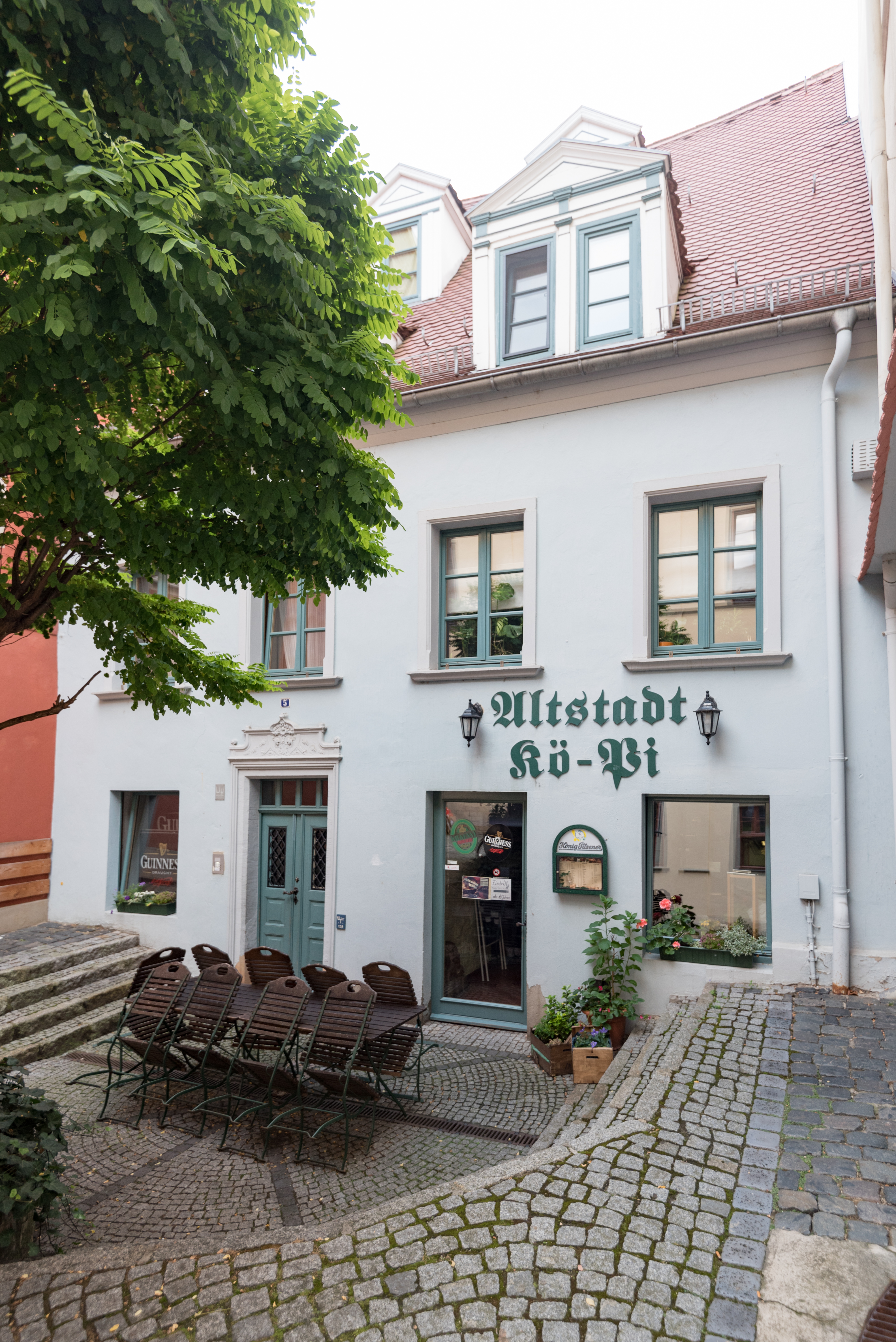 Naumburg (Saale), Engelgasse 5